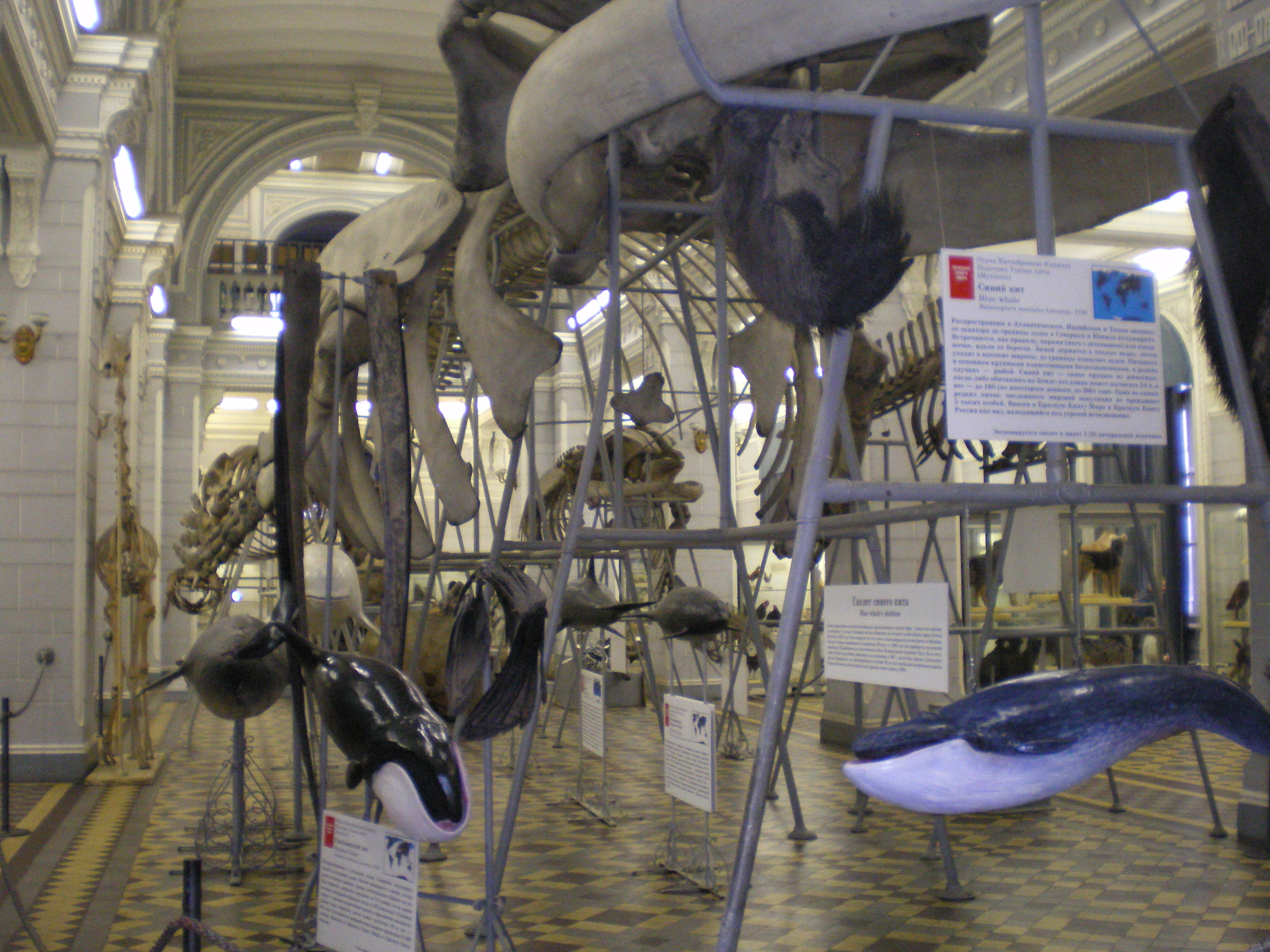 Зоологический музей. Первый зал